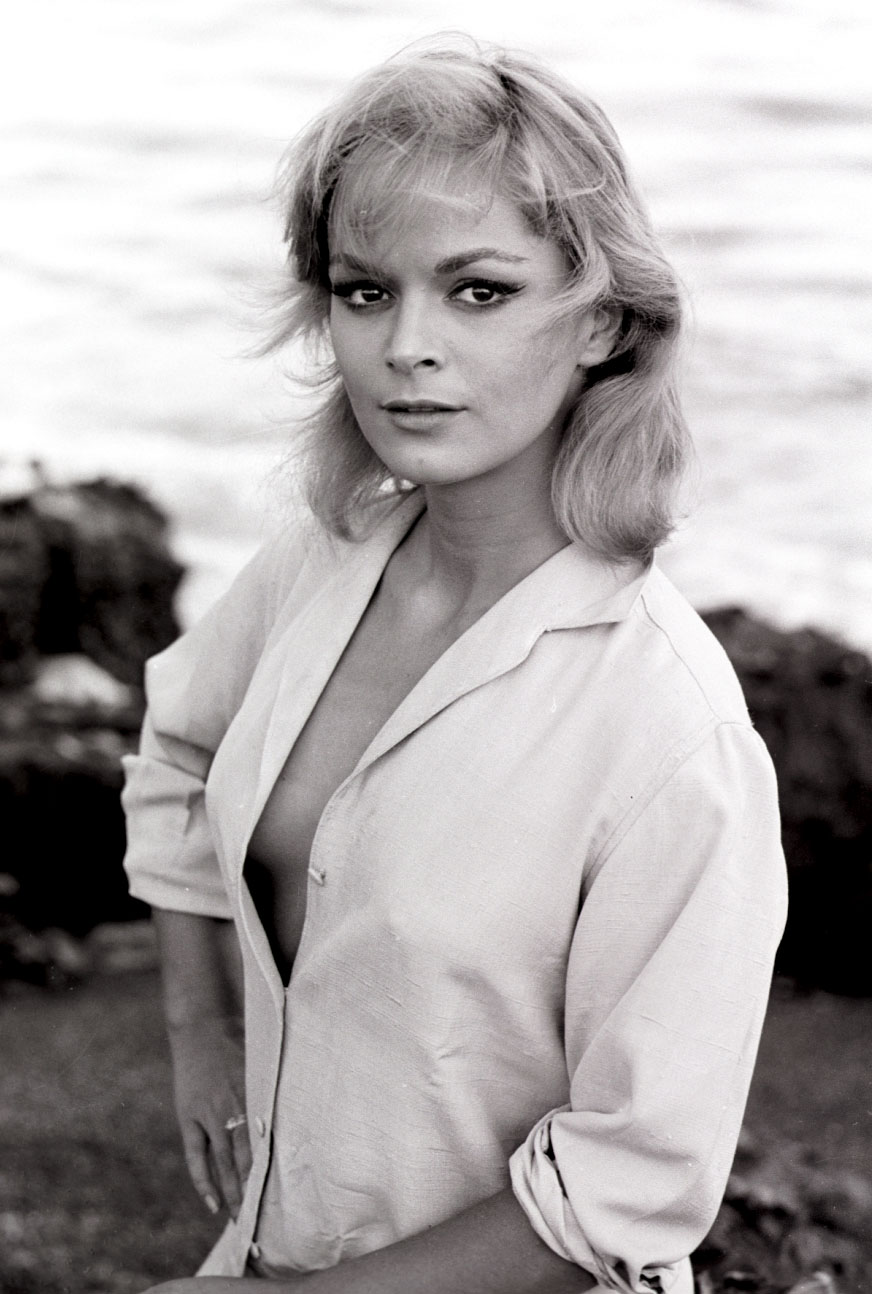 photo from magazine Settimanale illustrato, 1961